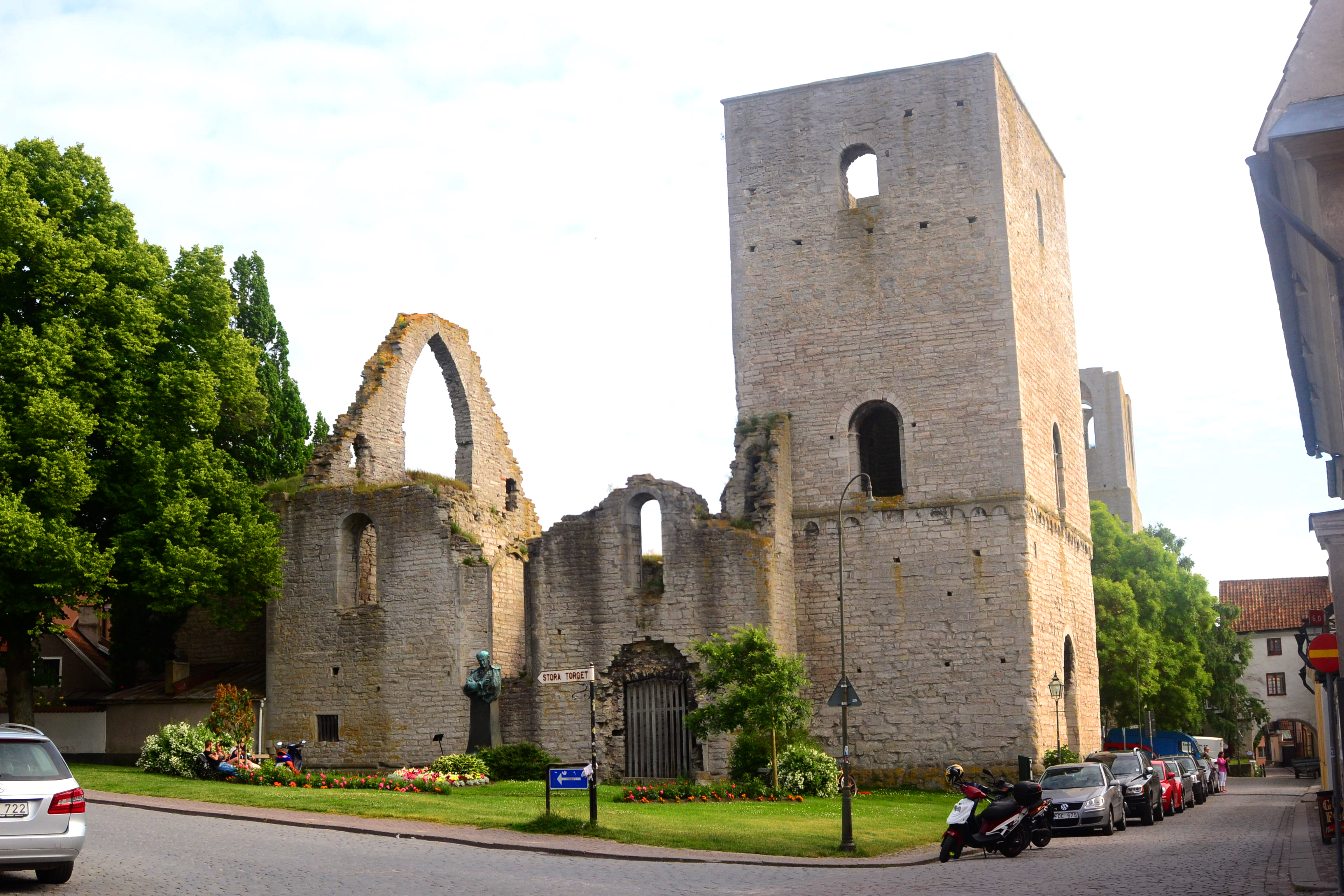 S:t Drotten ruin